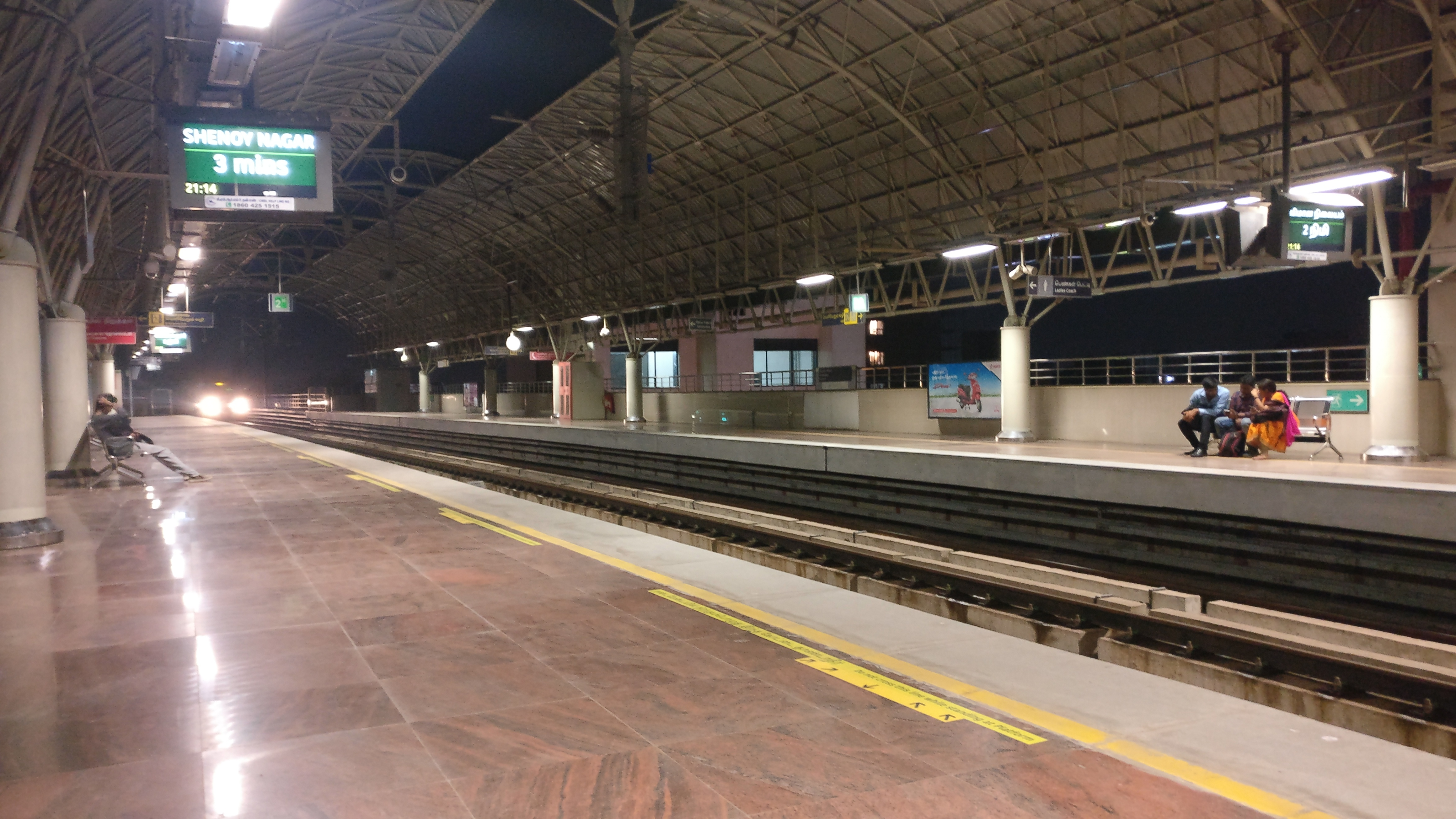 arumbakkam metro station, Chennai